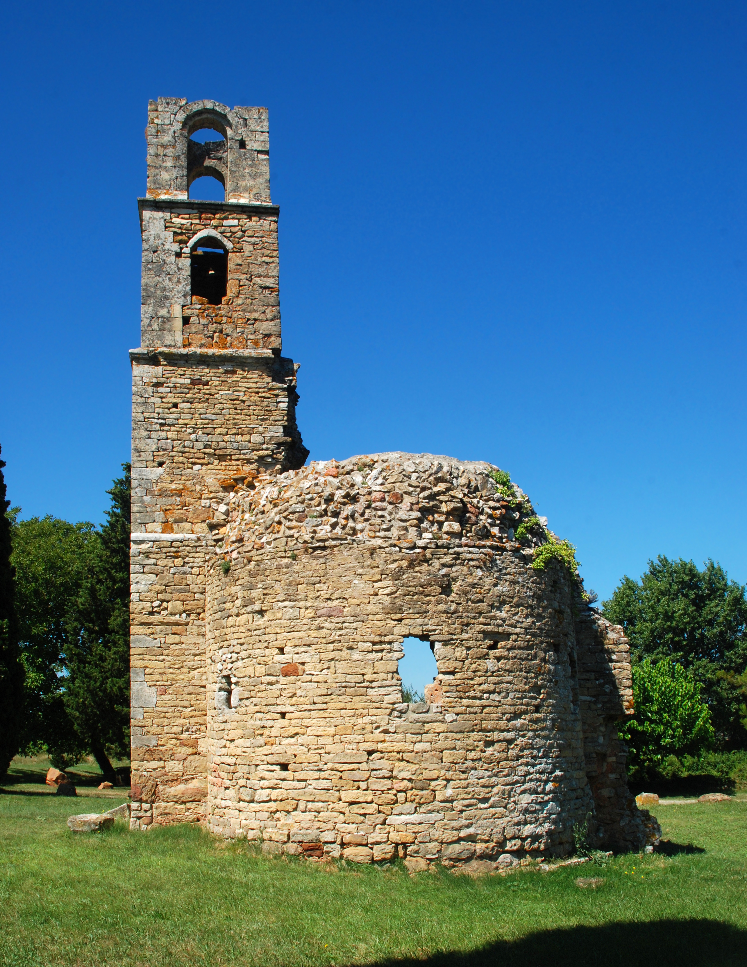 France - Gard - Chapelle Saint-Martin de Saint-Victor-la-Coste .